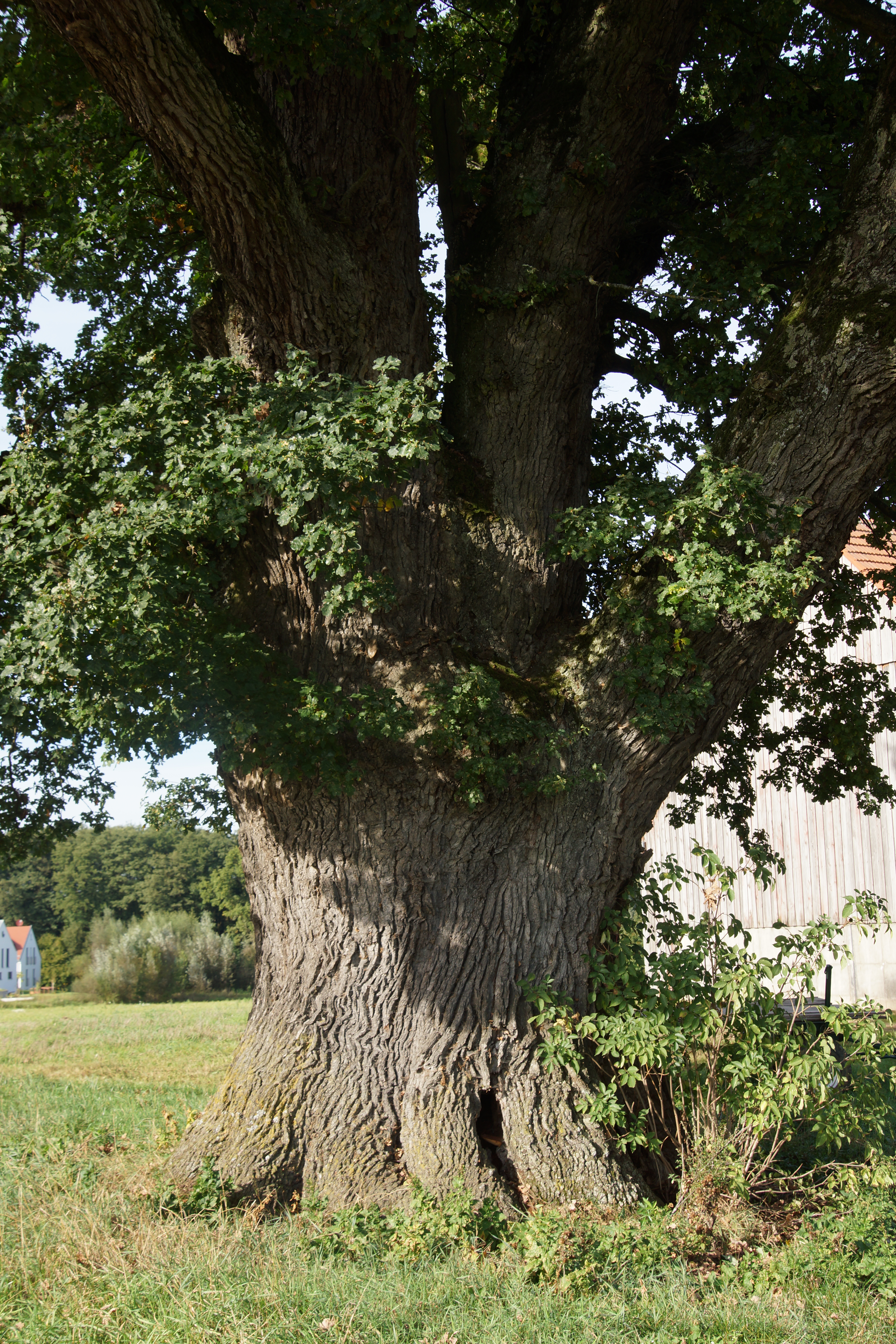 Die Eiche an der Eichenmühle im Norden von Neumarkt in der Oberpfalz